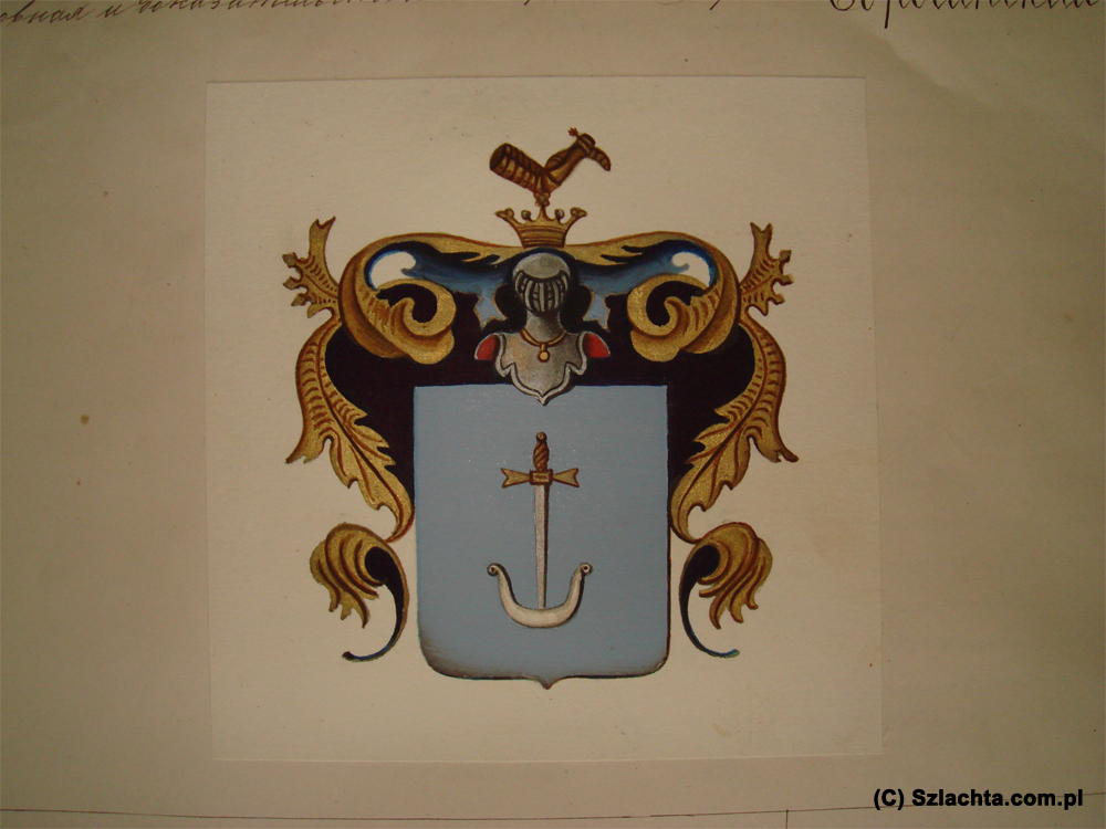 Państwowe Archiwum Obwodu Żytomierzskiego, Ukraina. Zespół 146, inwentarz 1, nr 476, karta 371.